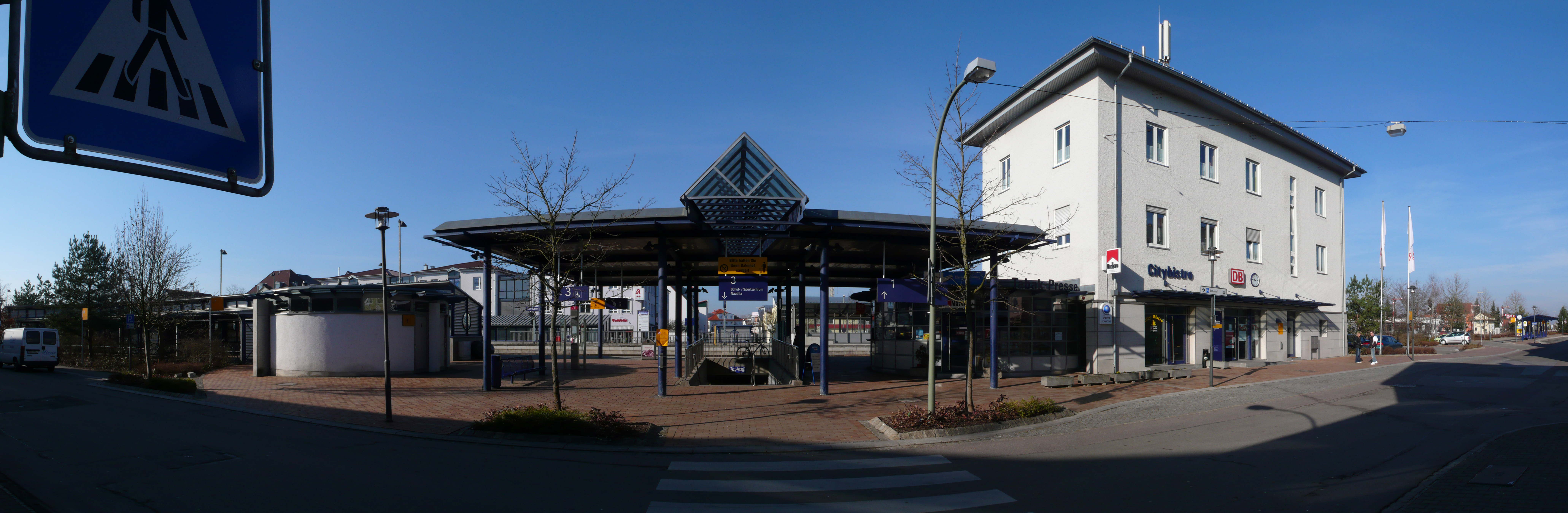 Panoramafoto Bahnhof Illertissen